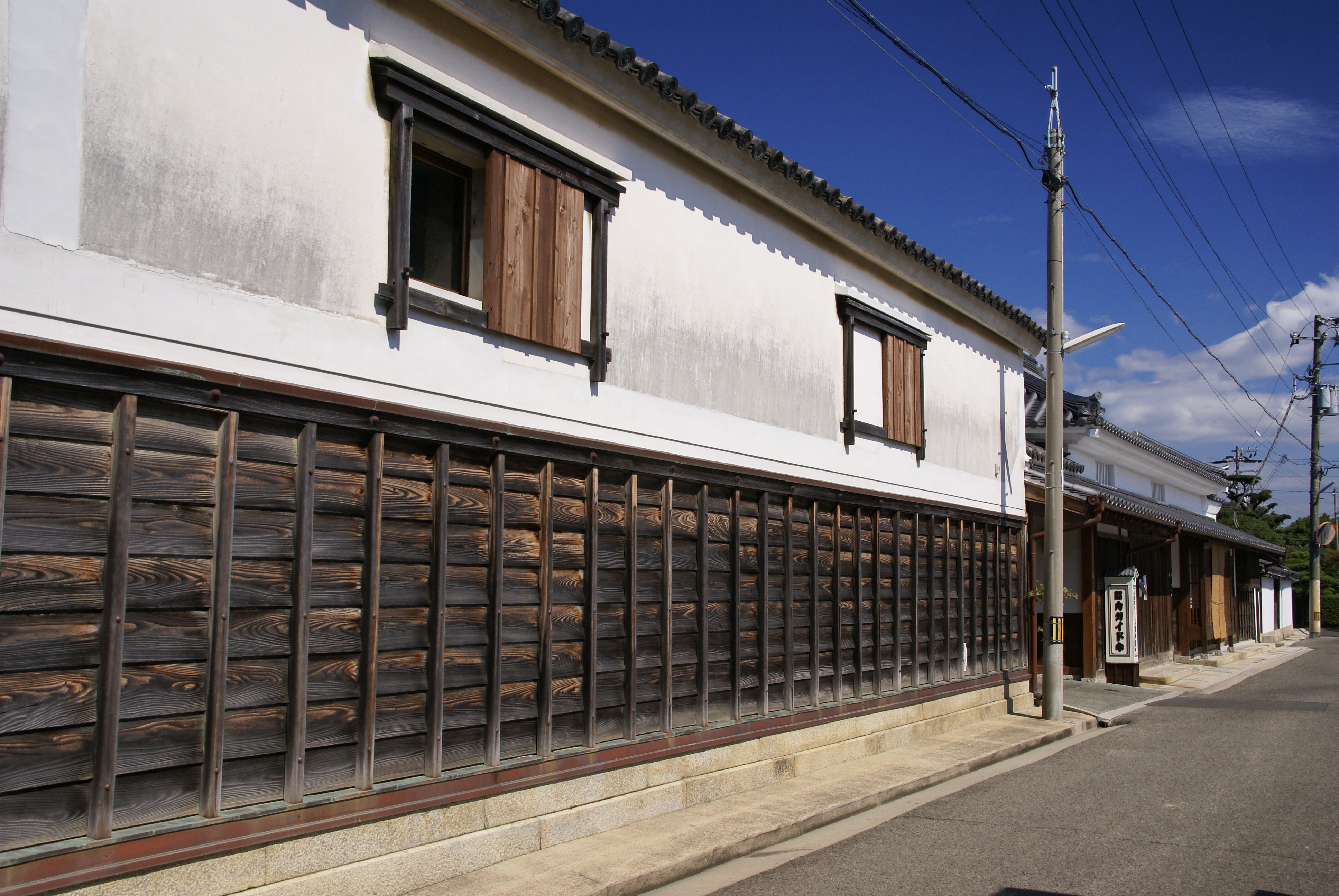 Sanshu Idutsu-yashiki in Hiketa, Higashikagawa, Kagawa prefecture, Japan